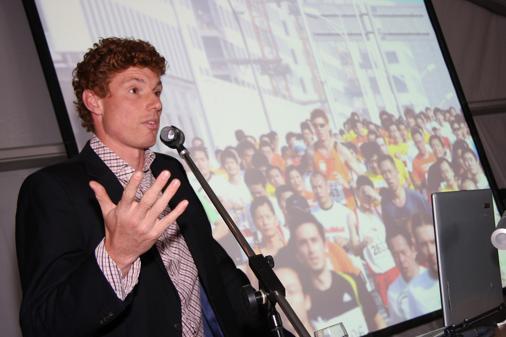 Bas van de Goor